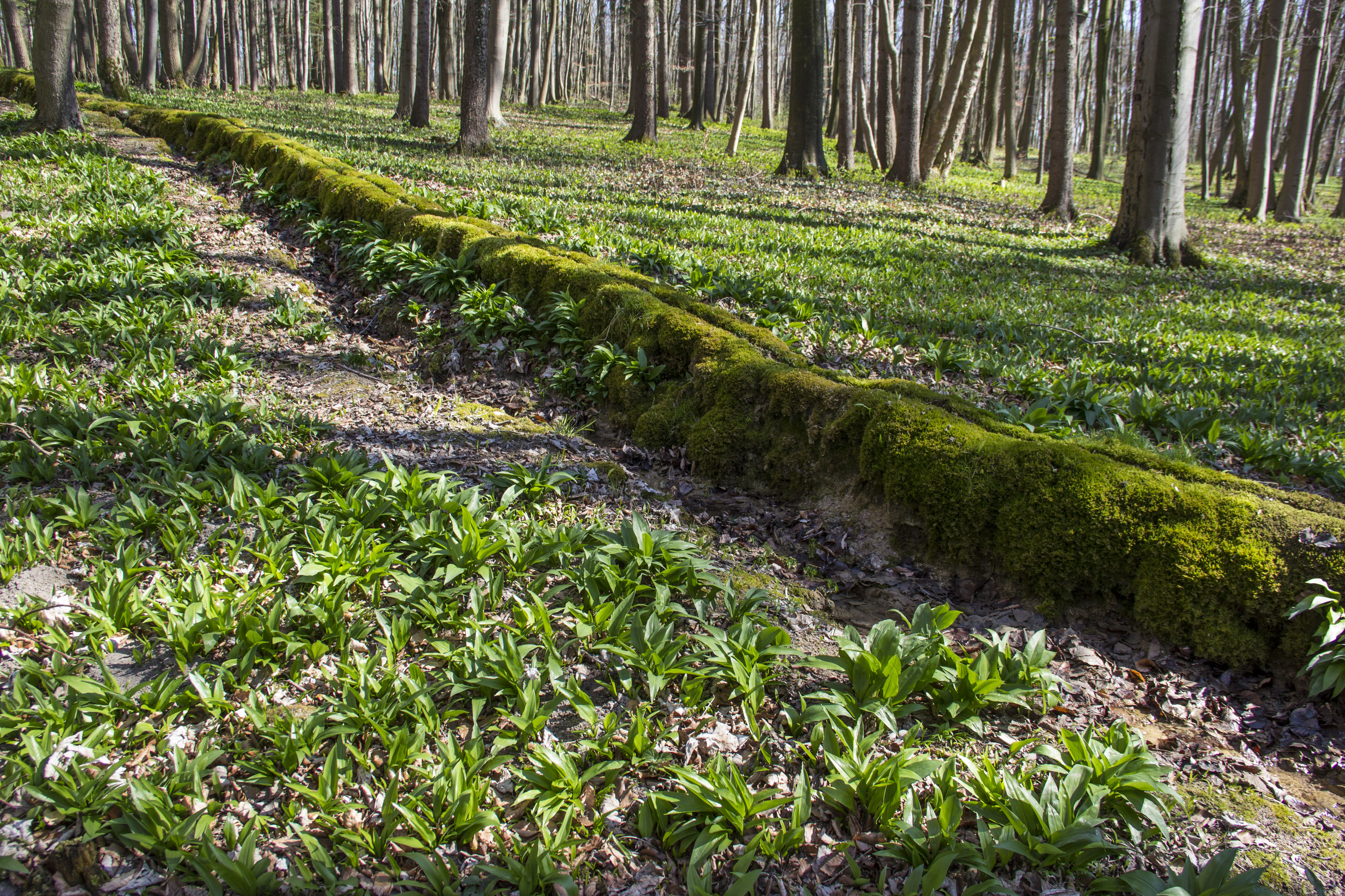 Käsrinne, Steinerne Rinne, Heidenheim